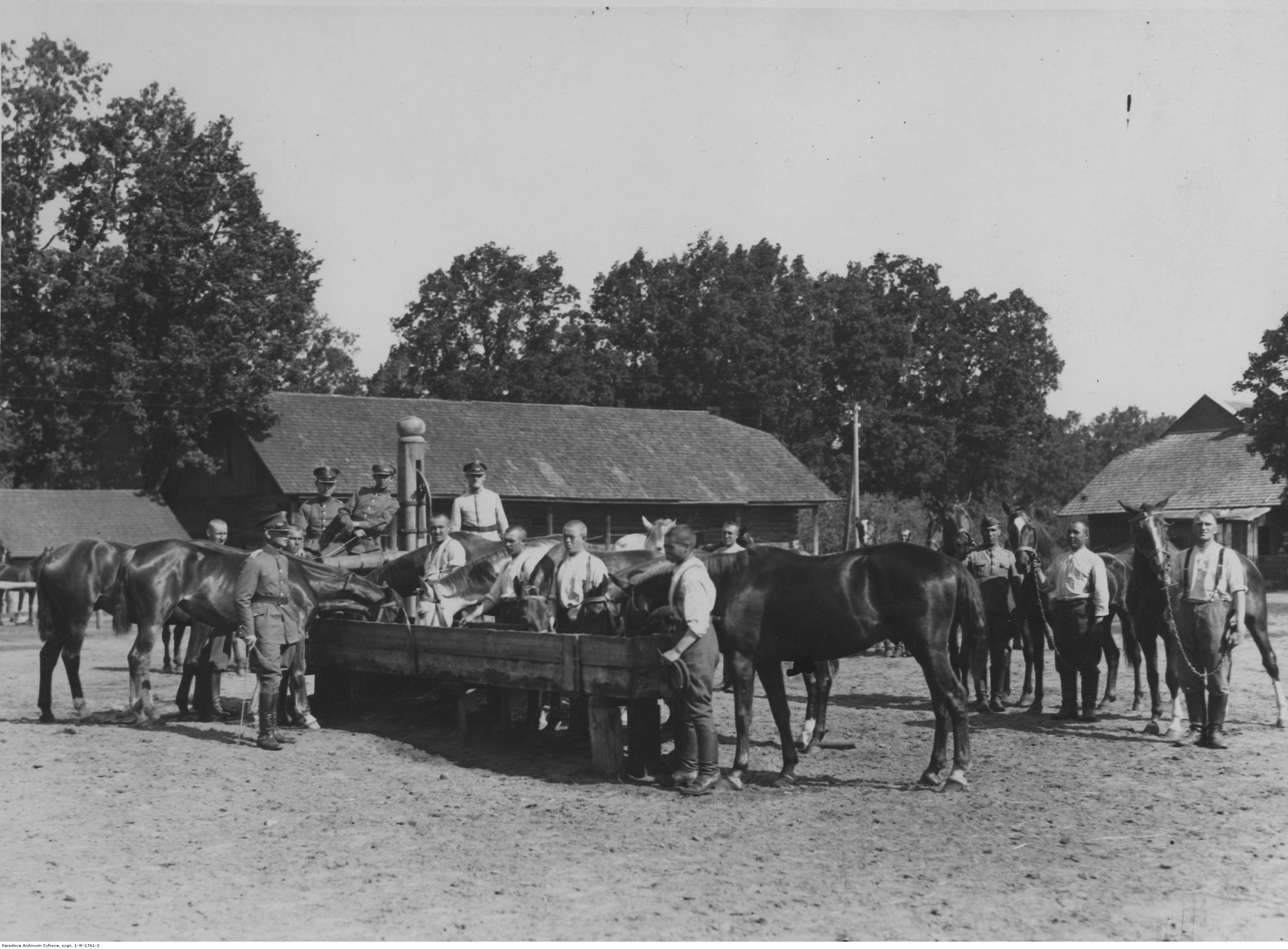 Pojenie koni w 16 szwadronie Korpusu Ochrony Pogranicza. Koncern Ilustrowany Kurier Codzienny - Archiwum Ilustracji